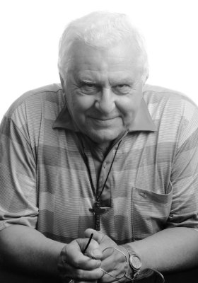 Simor Ottó - A debreceni színház társulati tagjává válásakor